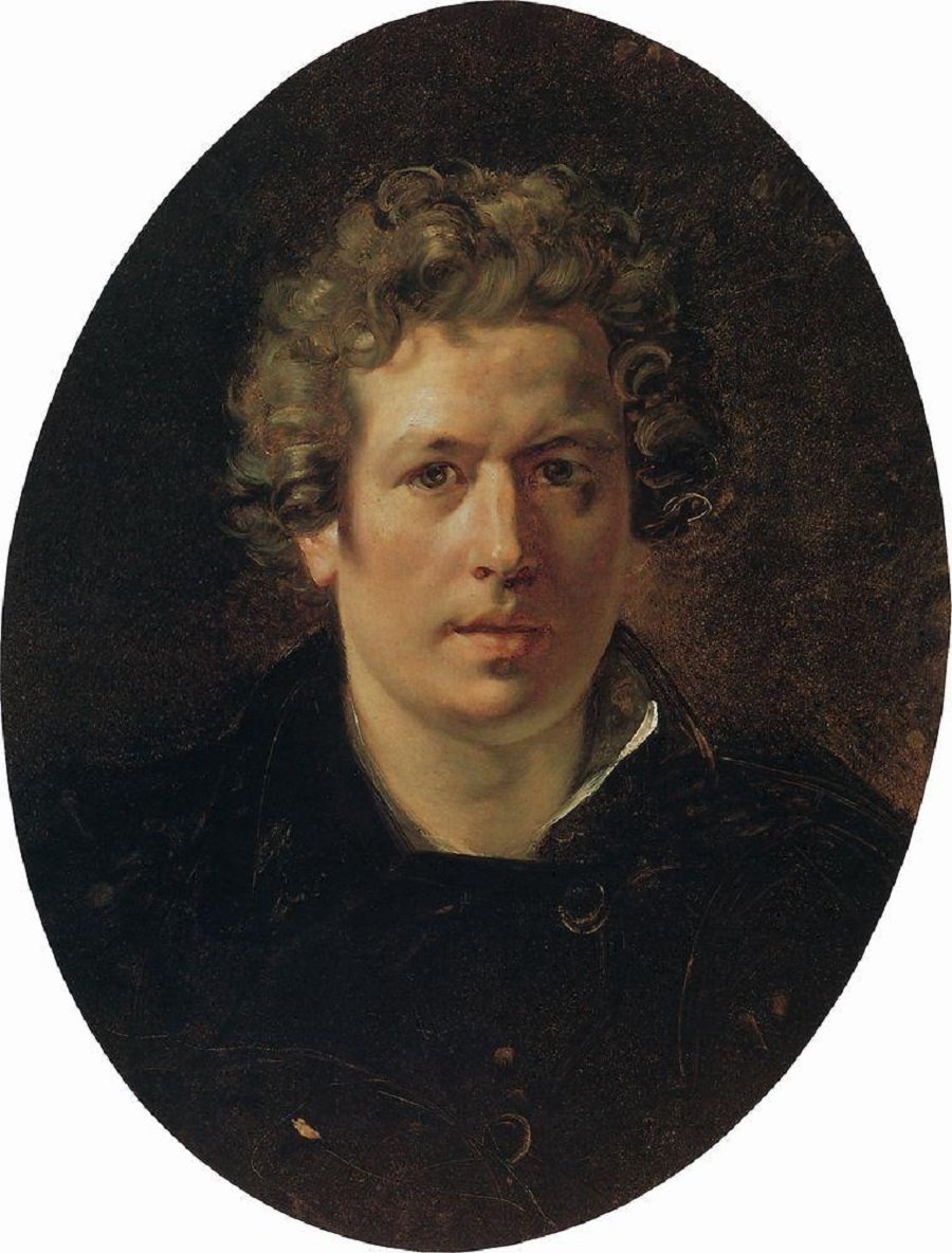 Self-portrait